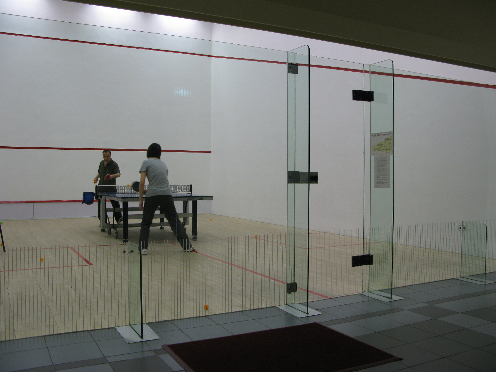 中文（香港）: 香港荃灣荃景圍體育館壁球室或乒乓球室